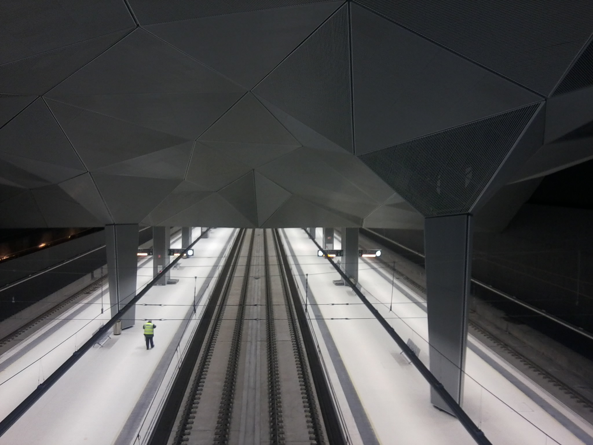 Los andenes de la estación subterránea de Logroño